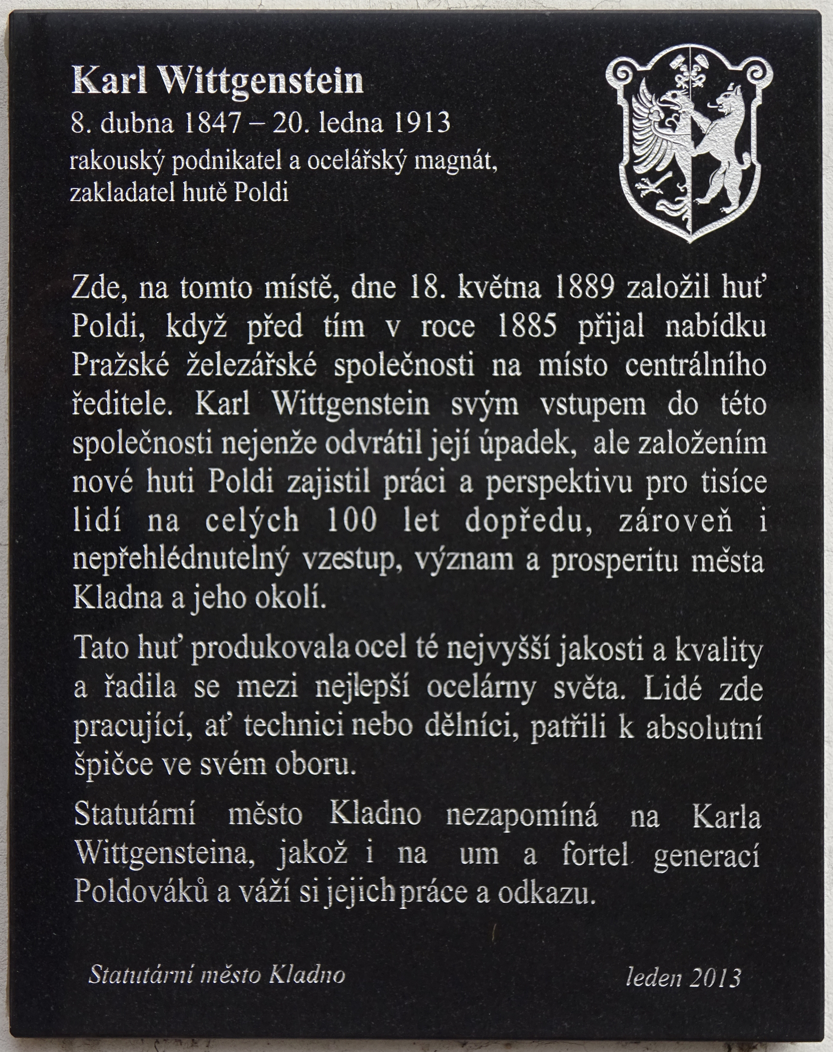 Karl Wittgenstein, pamětní deska na bráně Hutí Poldi (2020)